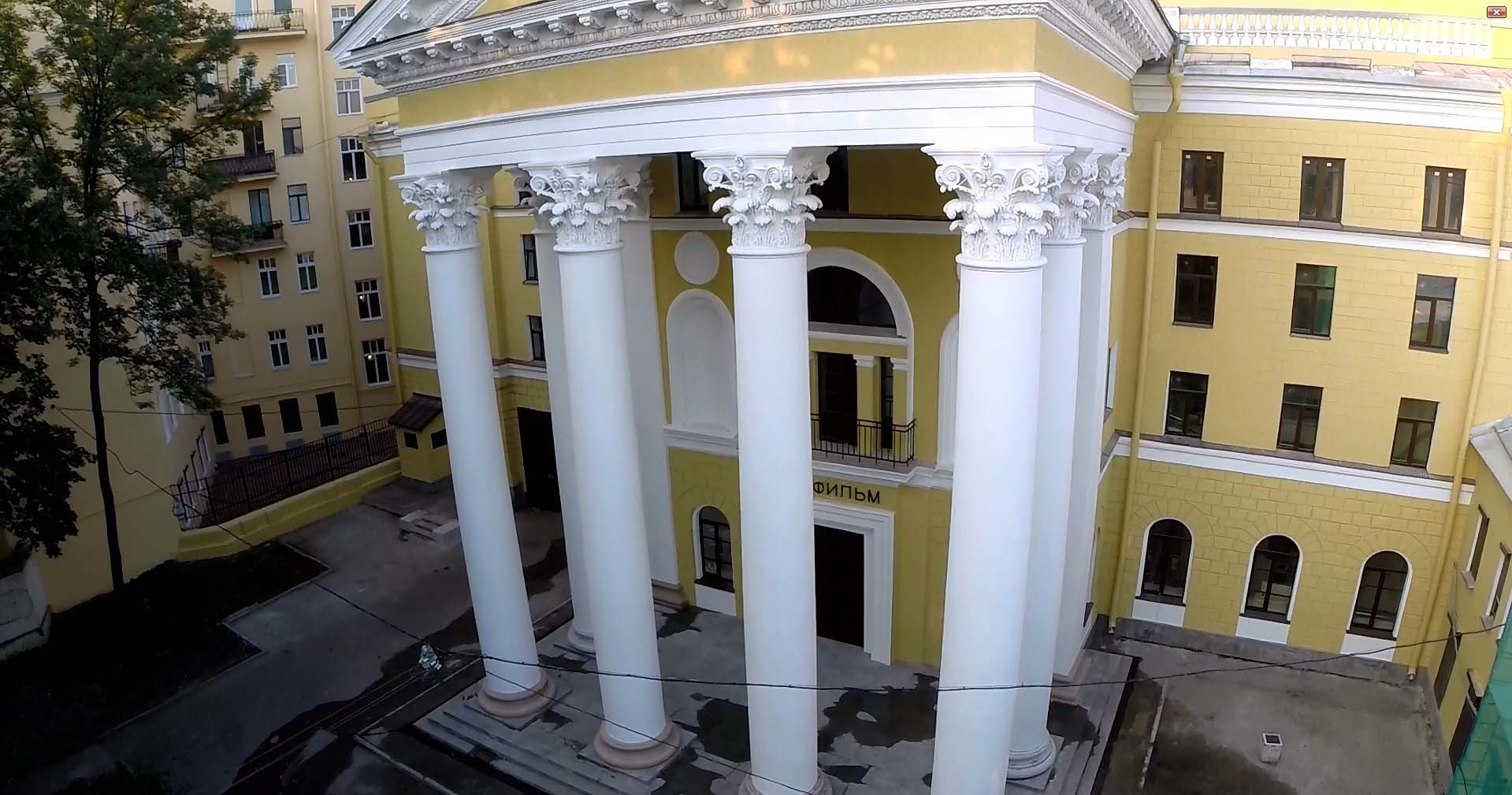 Ленфильм, отреставрированный главный вход